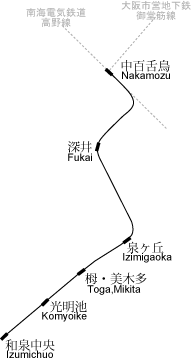 泉北高速鉄道路線図 投稿者作成